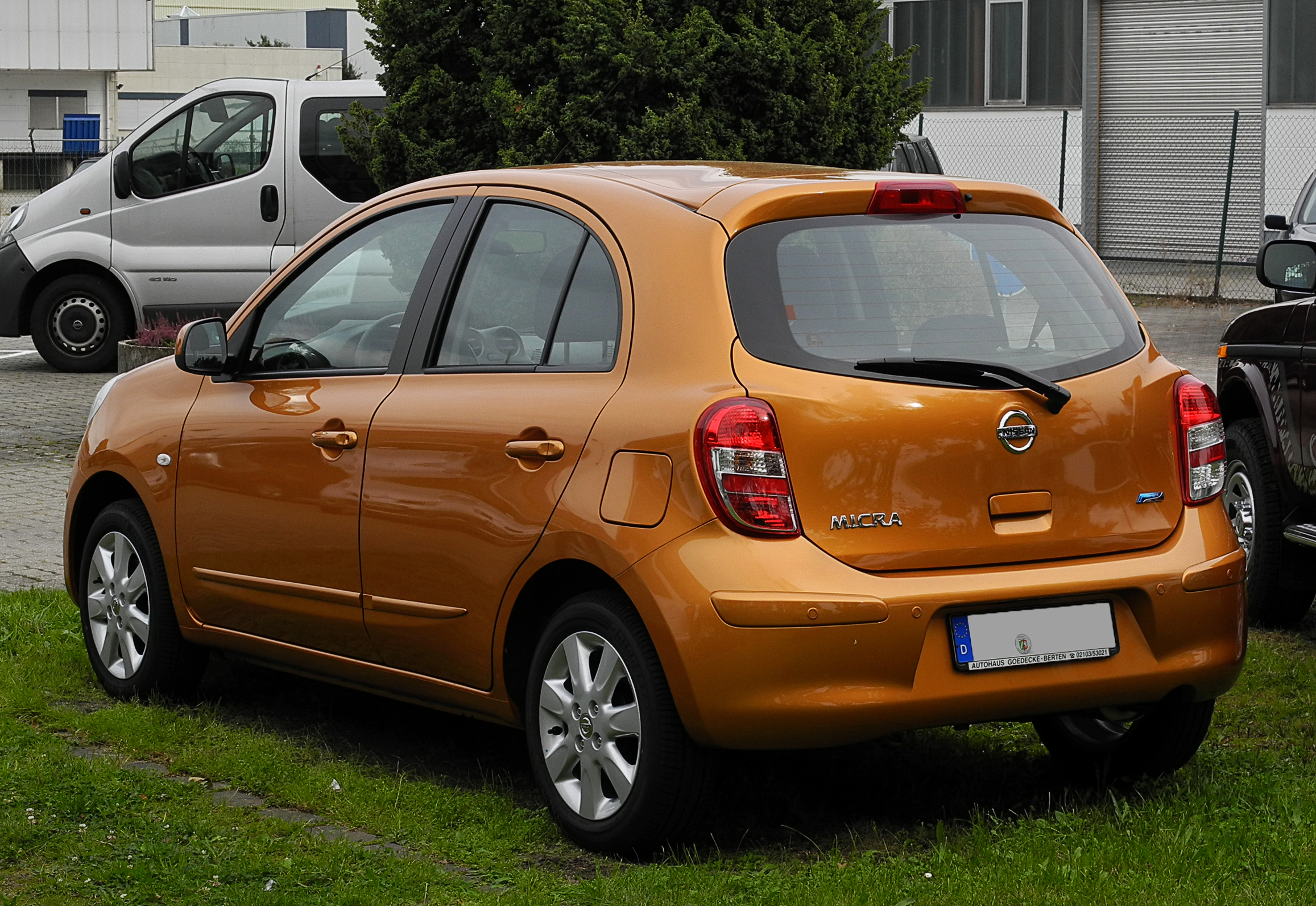 Nissan Micra 1.2 Acenta (K13)